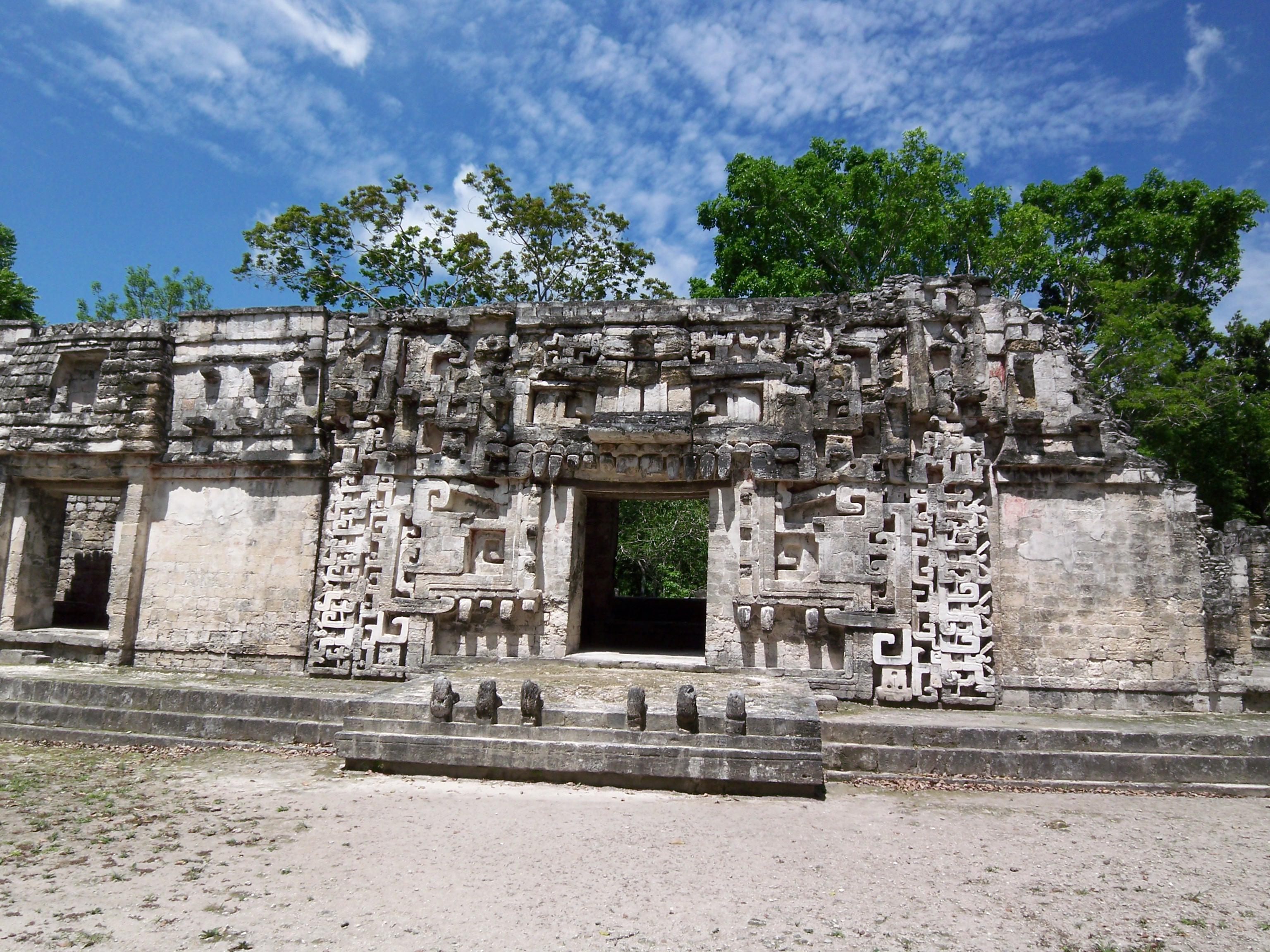 Chicanná Schlangenmaultür